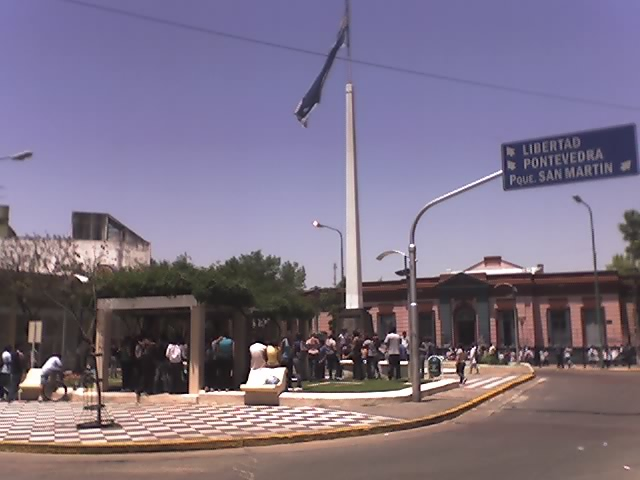 Festejos de fin de curso en Merlo.